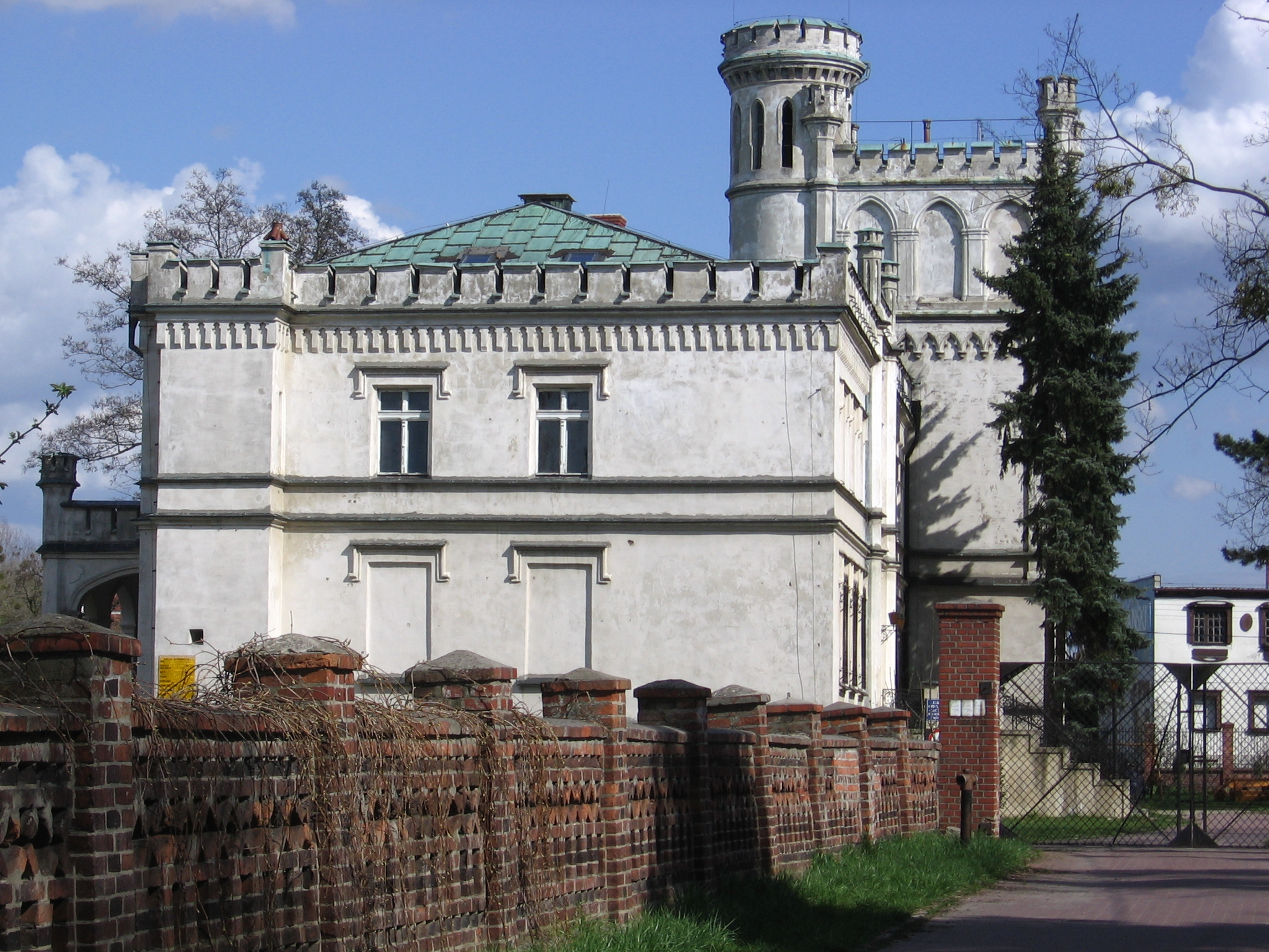 pałac w Mrozowie (gm. Miękinia, pow. średzki dolnośląski), obecnie zakład opiekuńczy dla dorosłych